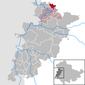 Nazza in Thuringia - Wartburgkreis